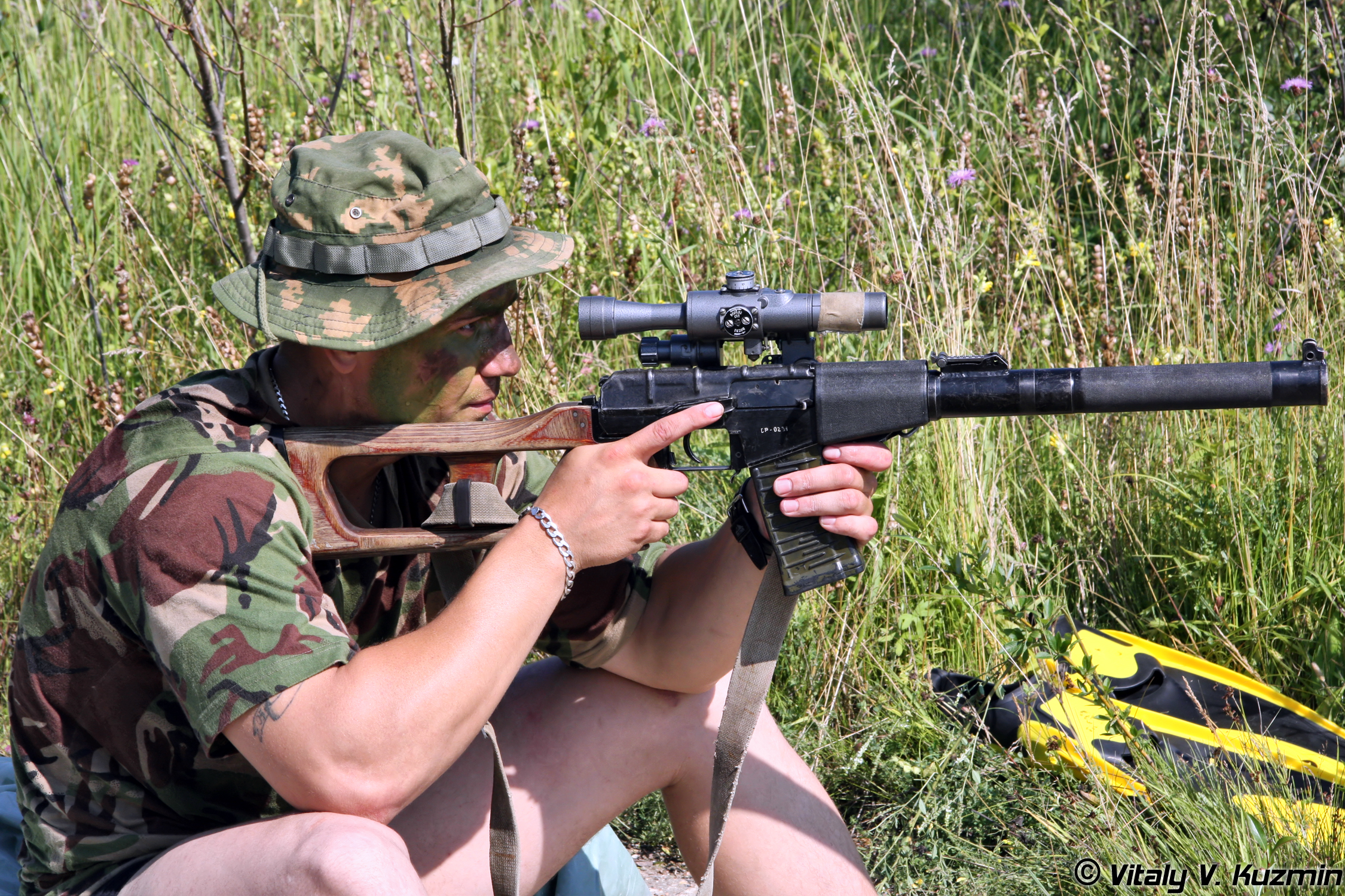 Действия разведгруппы (Reconnaissance group)